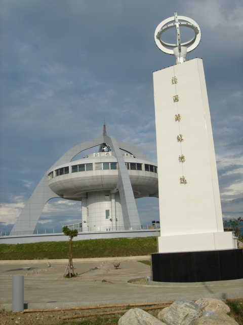 台湾嘉義県にある北回帰線の記念碑（北回帰線標塔）。2005年6月撮影（投稿者による）。